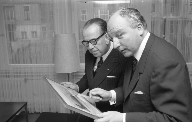 BM Scheel empfängt den türkischen Außenminister Erkin (mit Brille: der türkische Botschafter)